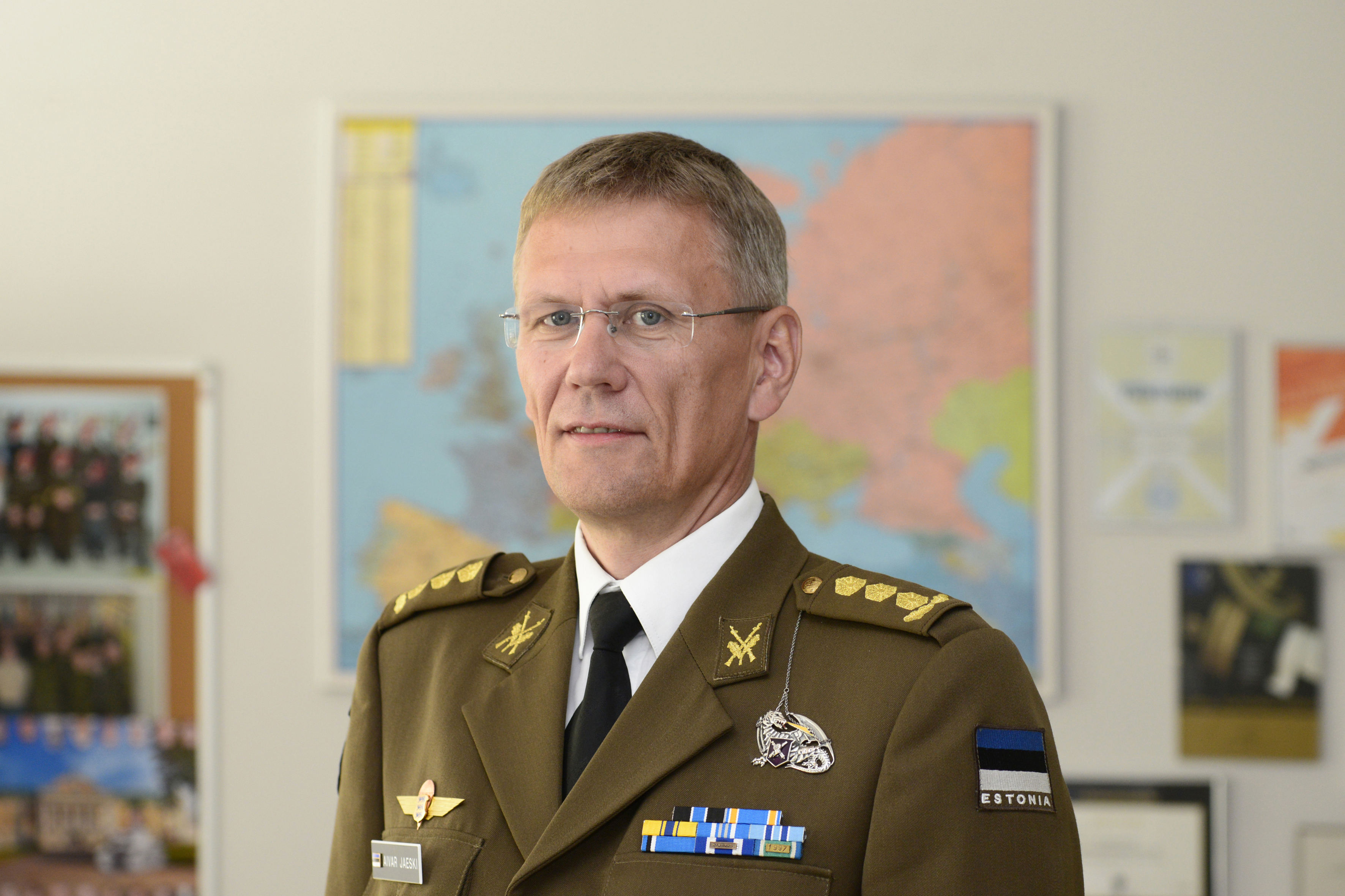 kolonel Aivar Jaeski, foto autor Tõnu Noorits